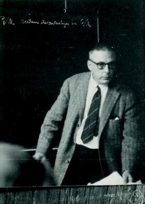 Foto di Marshall Hall